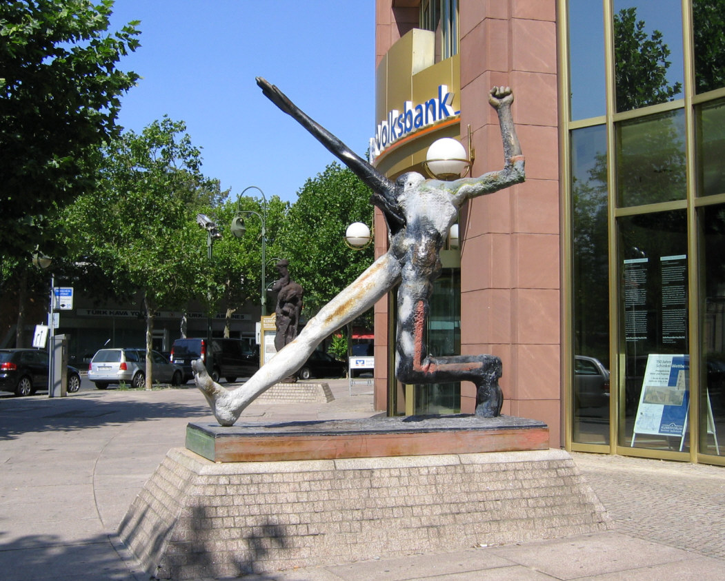 Skulptur "Der Jahrhundertschritt" (1984) von Wolfgang Mattheuer